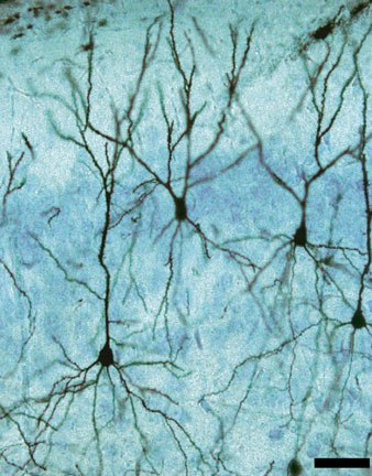 пирамидальный нейрон Беца